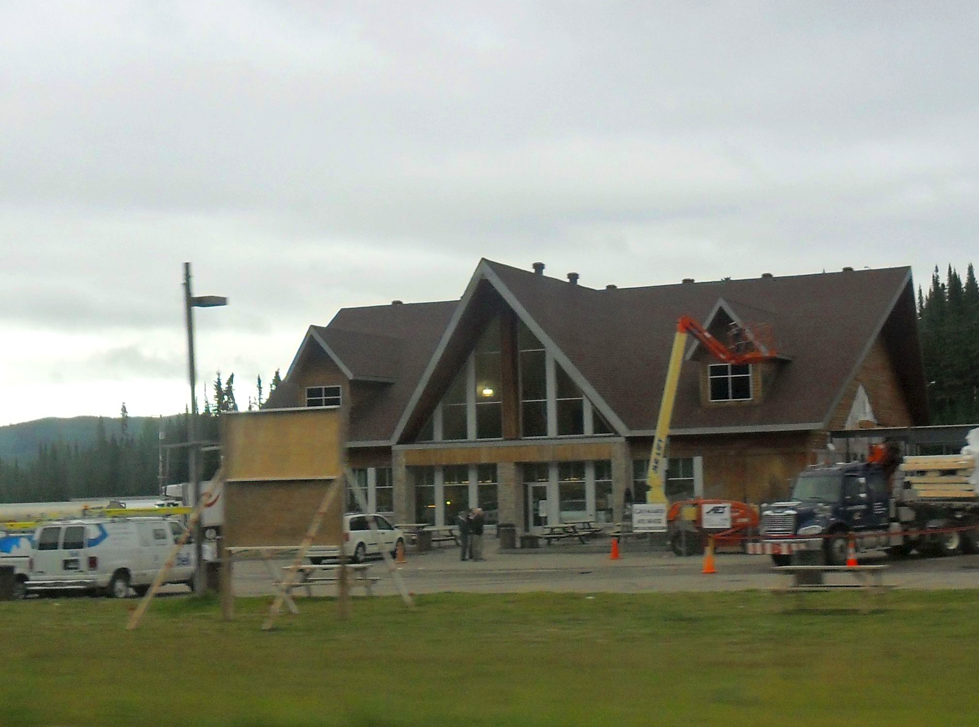 Halte-routière L'Étape, sur la route 175, Québec.